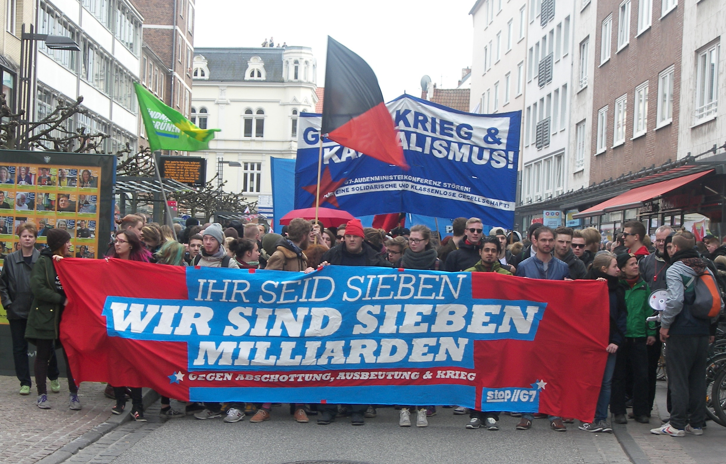 Anti-G7-Demo - Lübeck (Treffen der Außenminister): Transparent